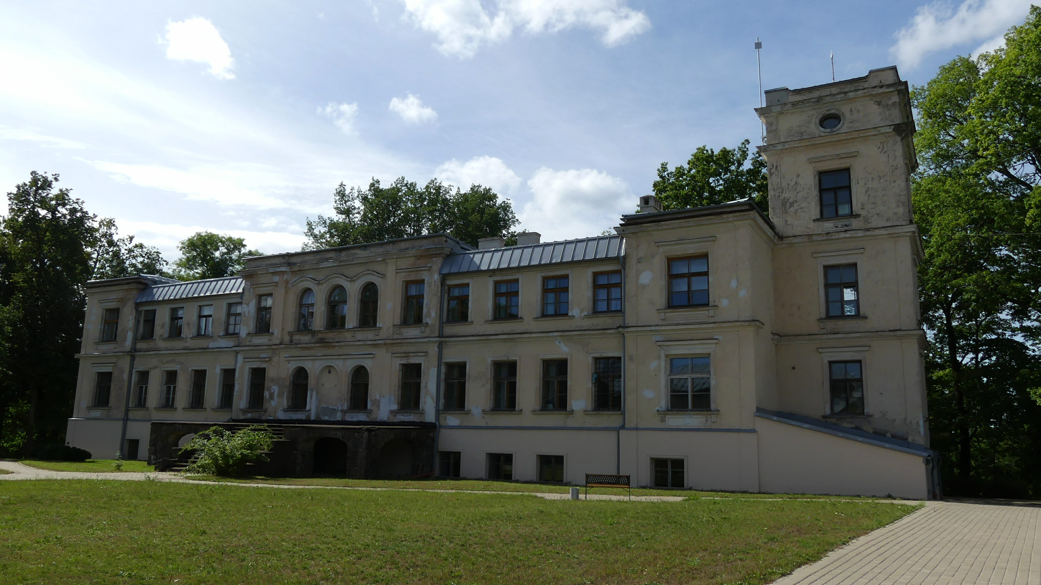 Alsviki mõisa peahoone 2018. aastal